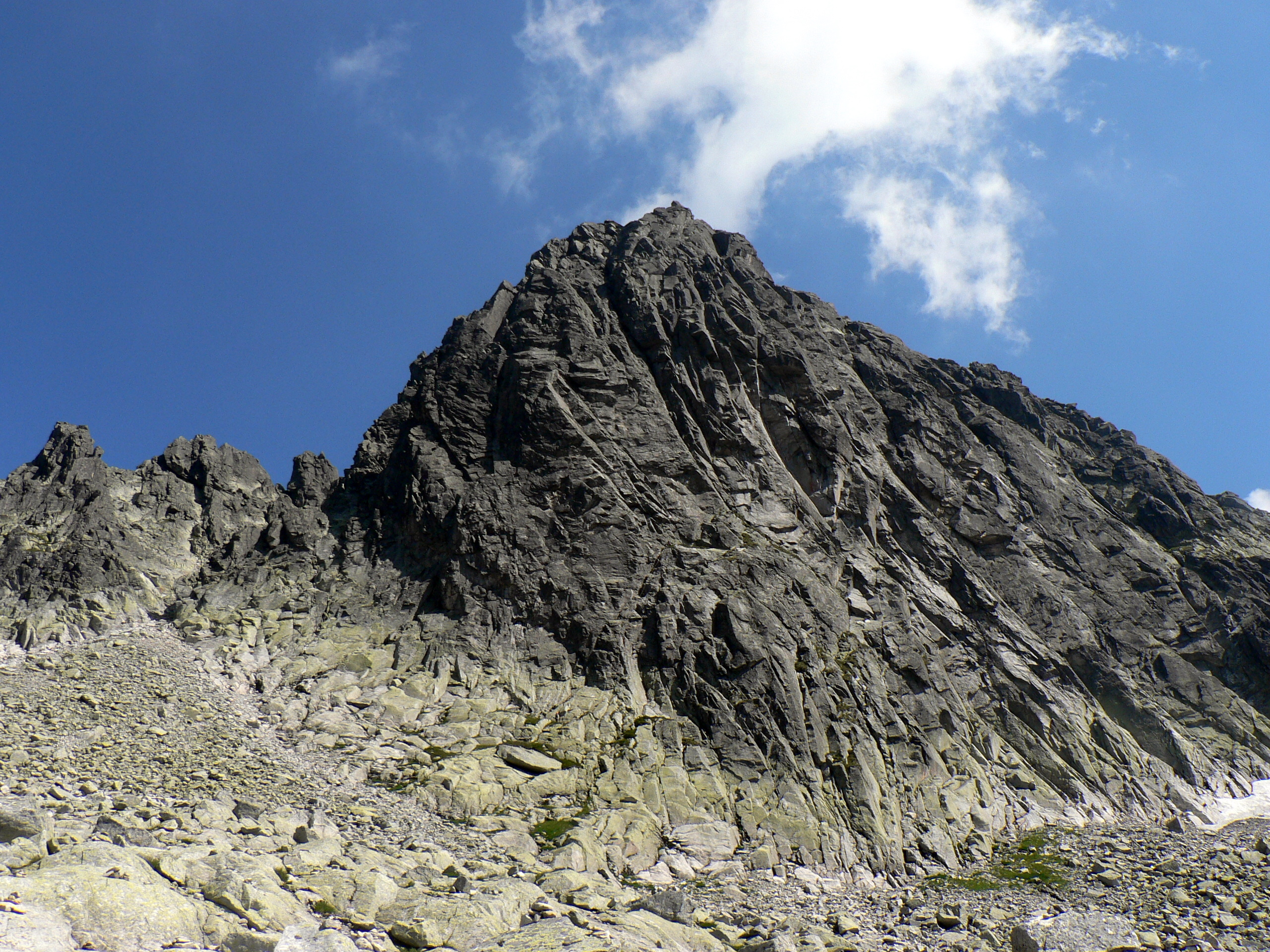 Mały Lodowy Szczyt ze szlaku z Czerwonej Ławki